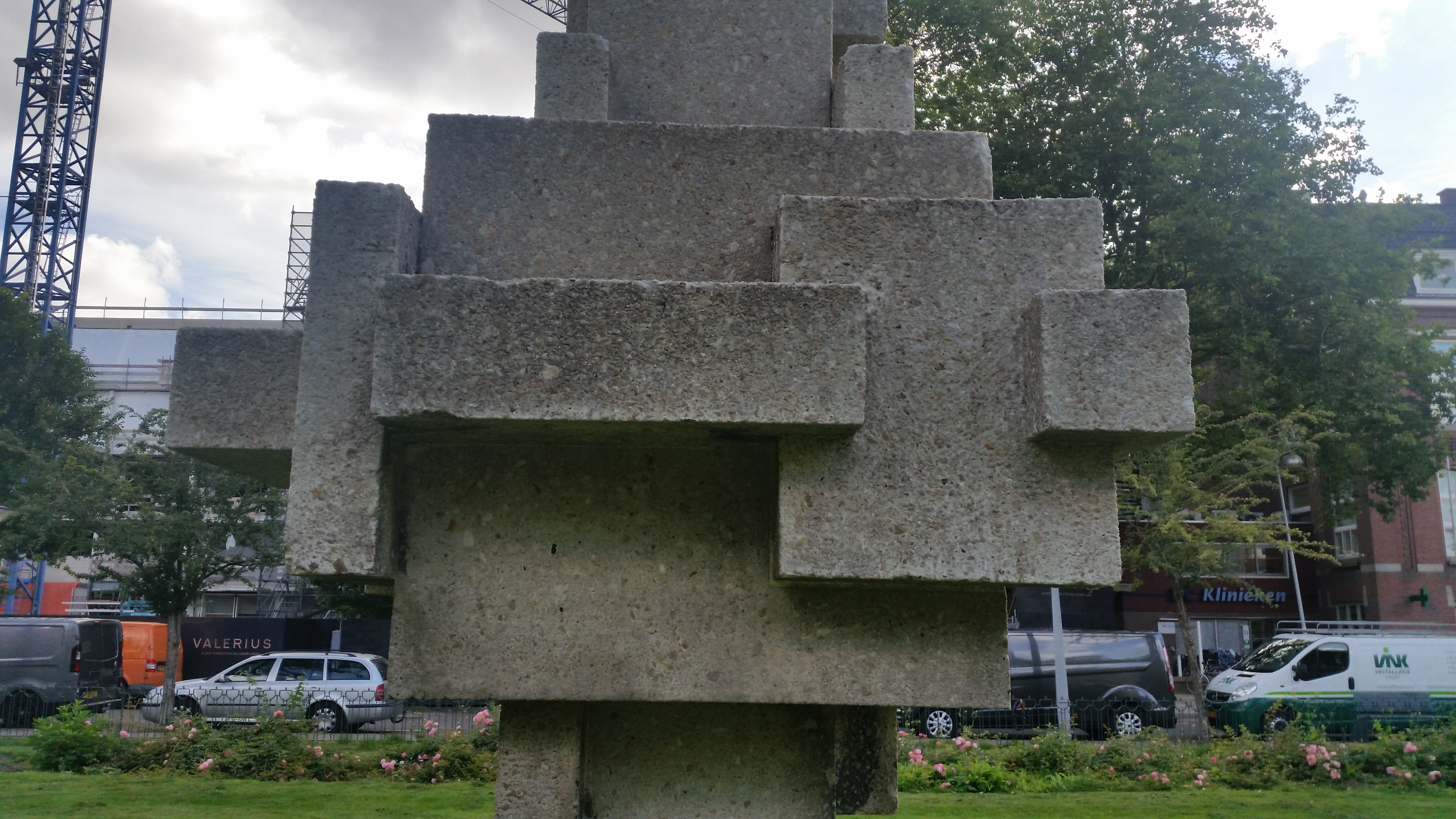 Impressie van Verticale compositie van Henk Zweerus op het Valeriusplein, Amsterdam-Zuid